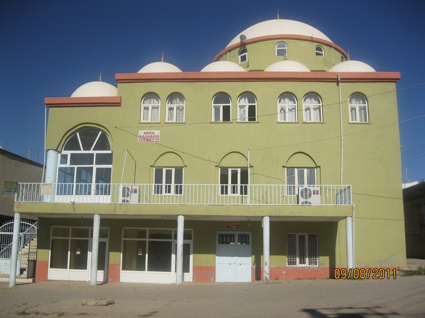 Argıl Ulu Camii